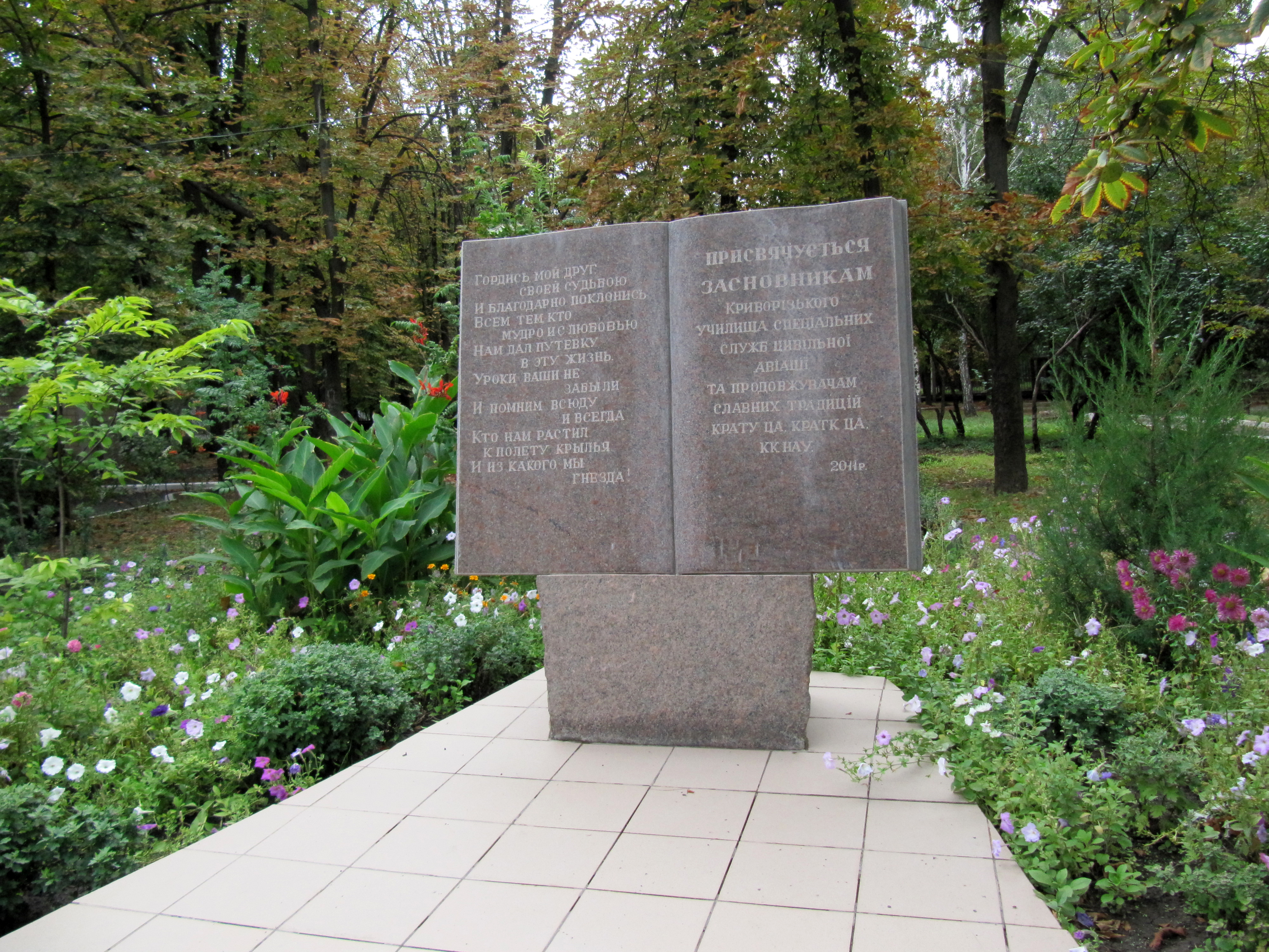 Пам’ятний знак на честь 60-річчя від дня заснування Криворізького коледжу Національного авіаційного університету